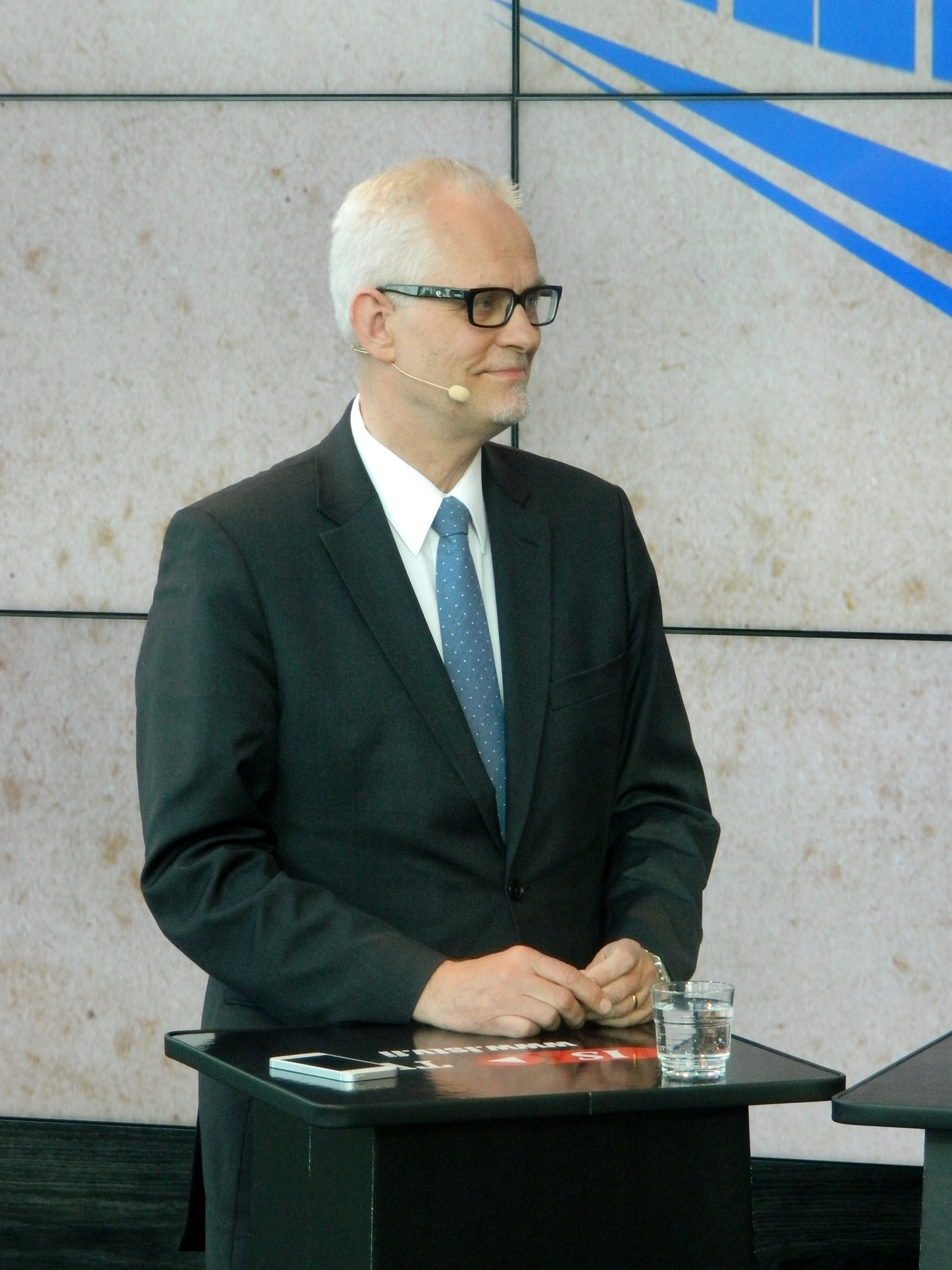 Kokoomuksen europarlaamentaarikko Petri Sarvamaa Ilta-Sanomien eurovaali väittlyssä Sanomatalolla 15.5.2014.